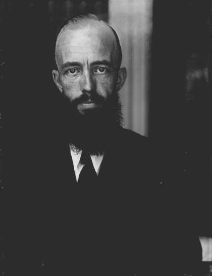 Johannes Antonius Alphonsus (Jan) Mekel (Bedum 22 december 1891 - Sachsenhausen 3 mei 1942)